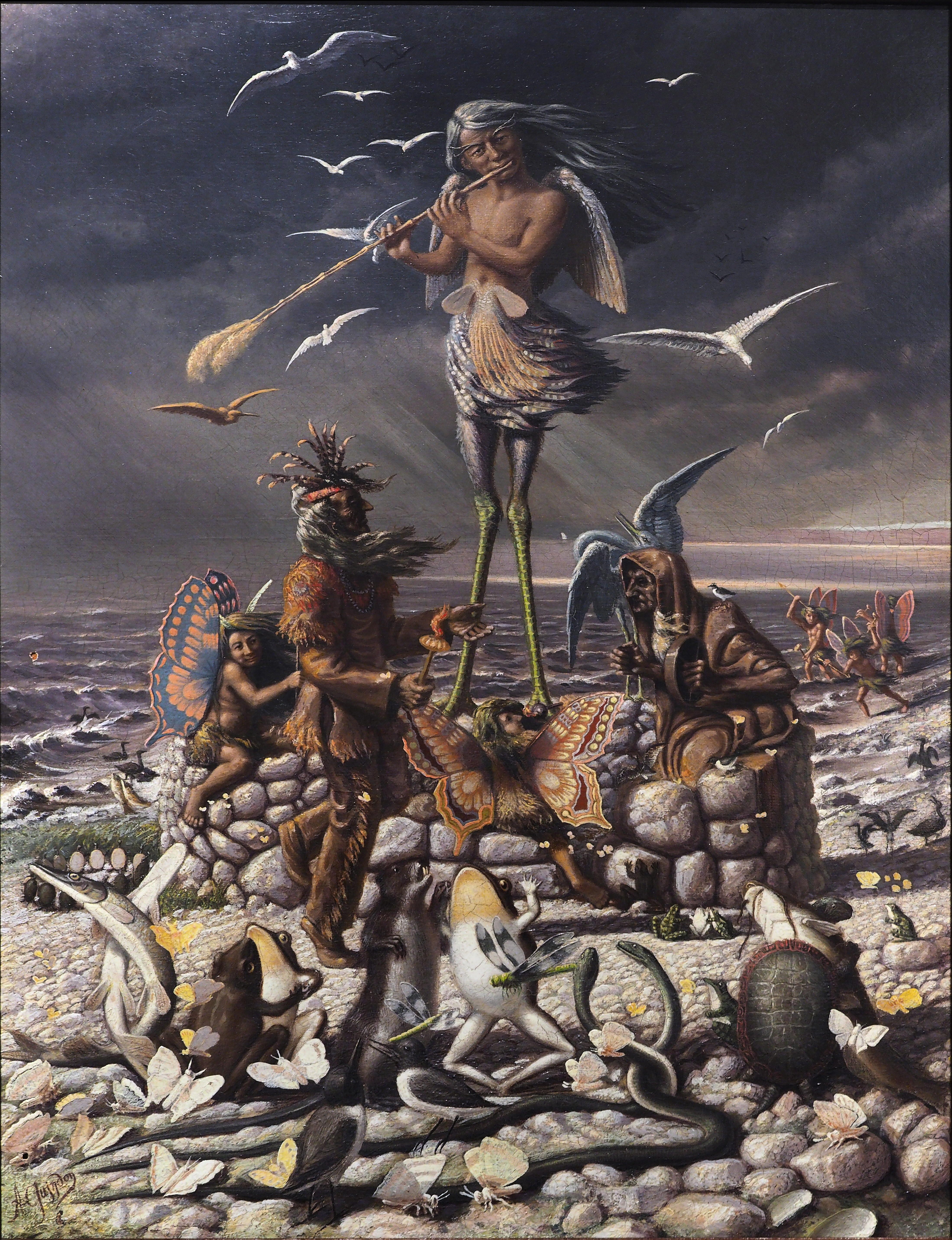 Représentation d'une légende amérindienne par le sulpicien Arthur Guindon, vers 1920.